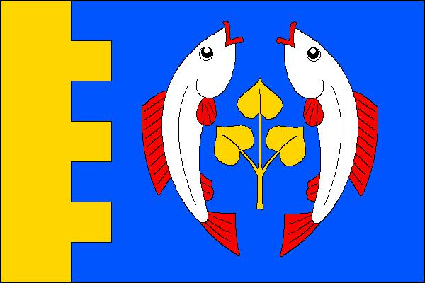 Vlajka obce Slavíkov (okres Havlíčkův Brod)